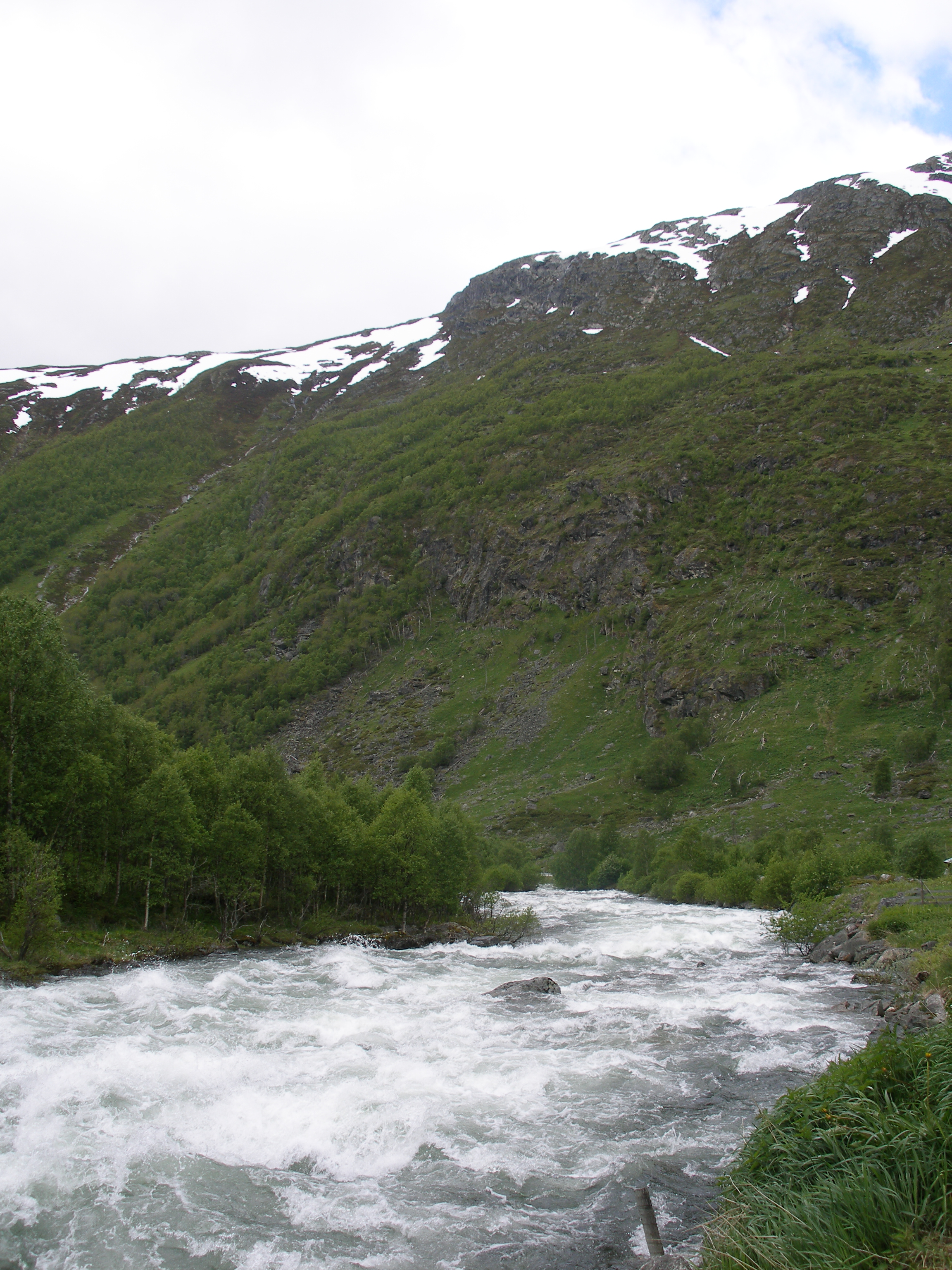 River Lærdalselvi by Gram gardsbutikk. Norway, June 2005.